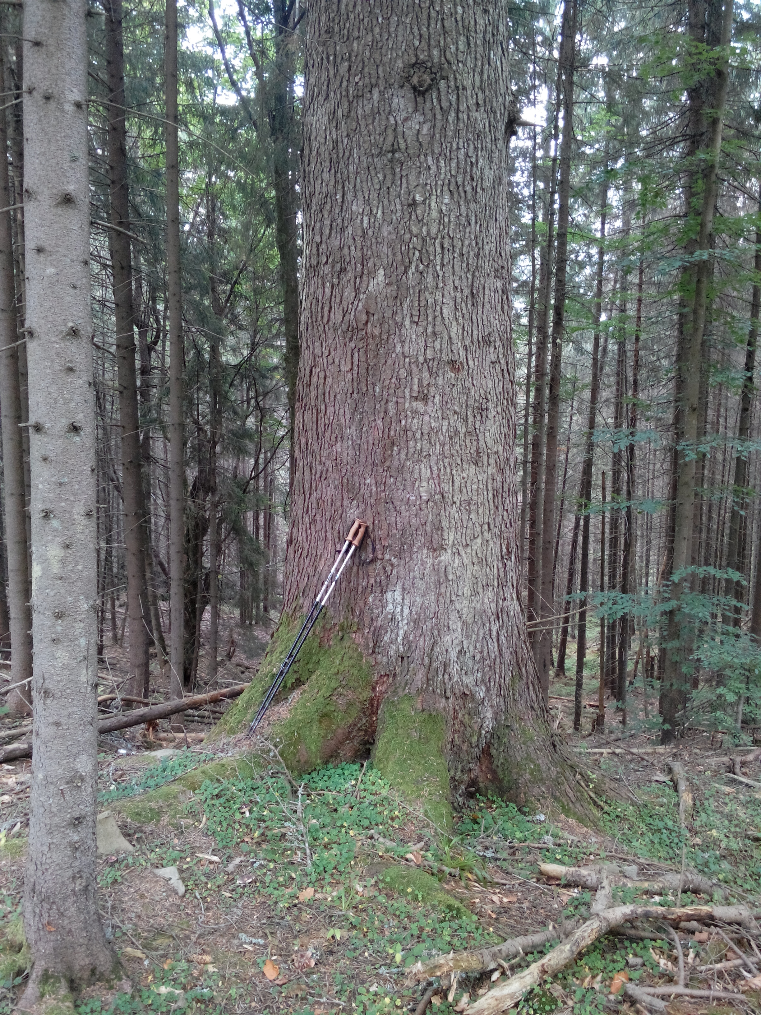 Abies Alba the Reign